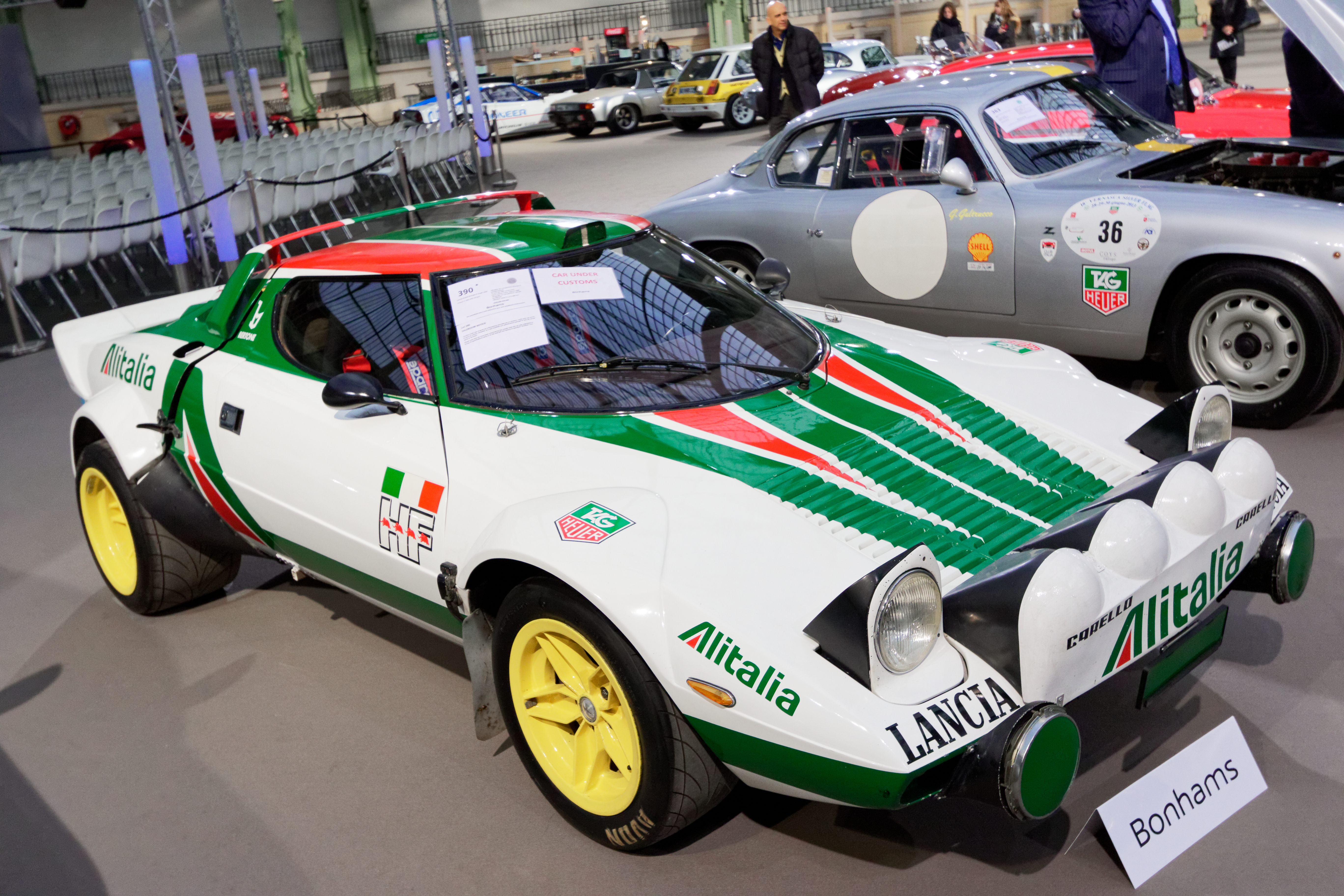 Un des véhicules présenté lors de la vente aux enchères Bonhams 2017 au Grand Palais de Paris.